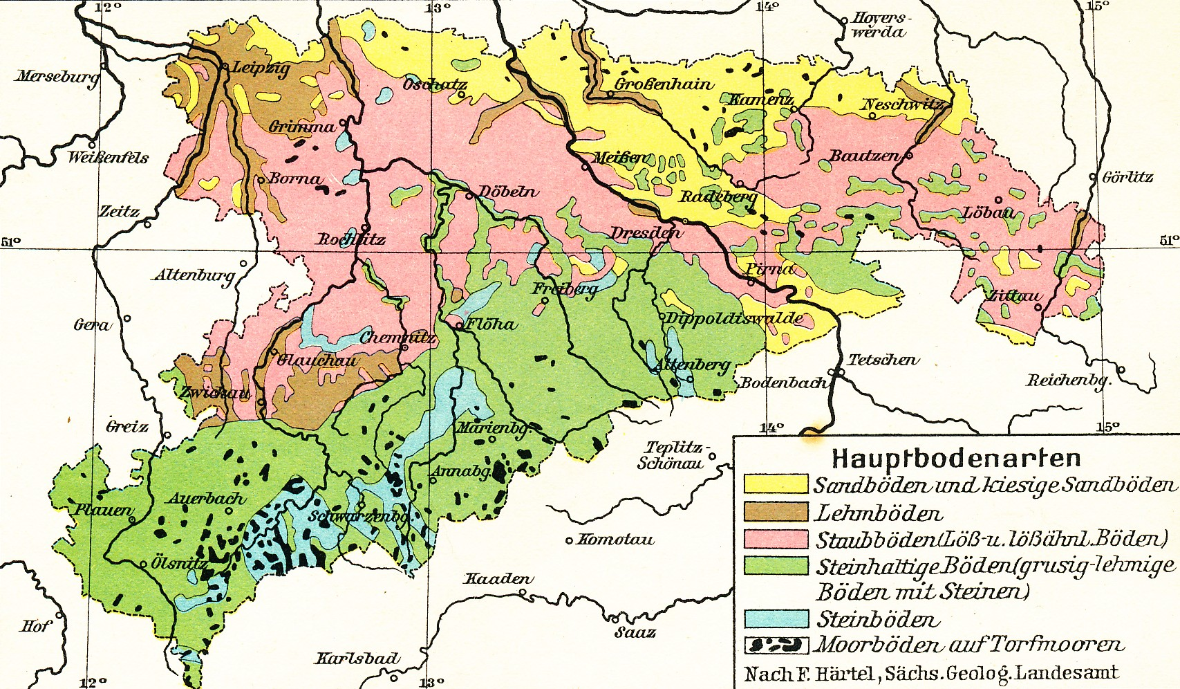 Freistaat Sachsen, Hauptbodenarten This is a part of an old atlas. It does not represent the current situation.